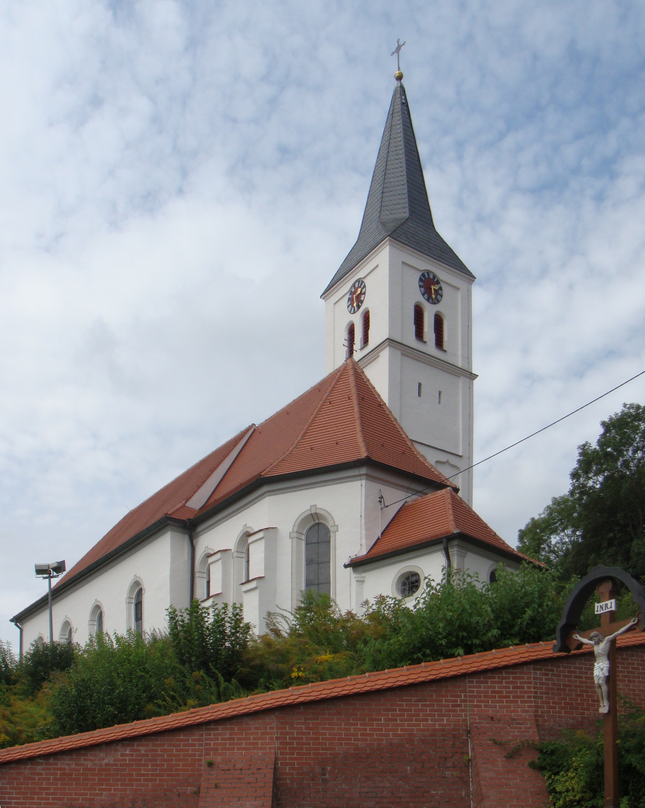 Katholische Pfarrkirche St. Peter und Paul, Bellenberg, Landkreis Neu-Ulm